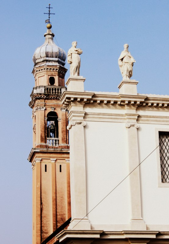 Campanile di San Benedetto Vecchio